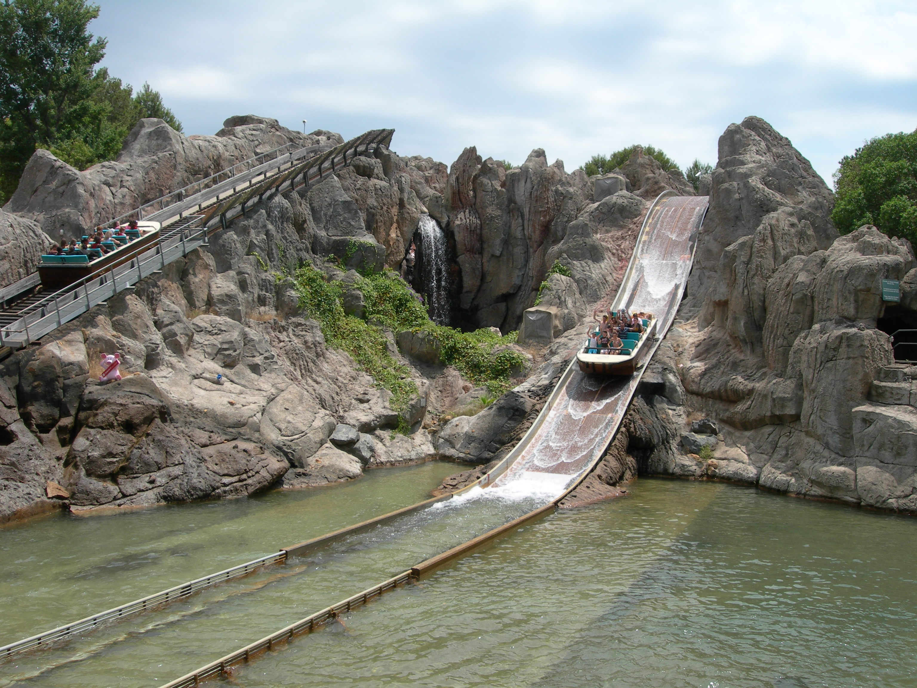 Tutuki Splash at Port Aventura, Spain